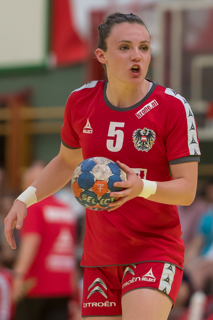 Damenhandball WM-Qualifikation Playoff Österreich vs Rumänien am 13. Juni 2017 in Stockerau. Bild zeigt Sonja Frey (AUT).